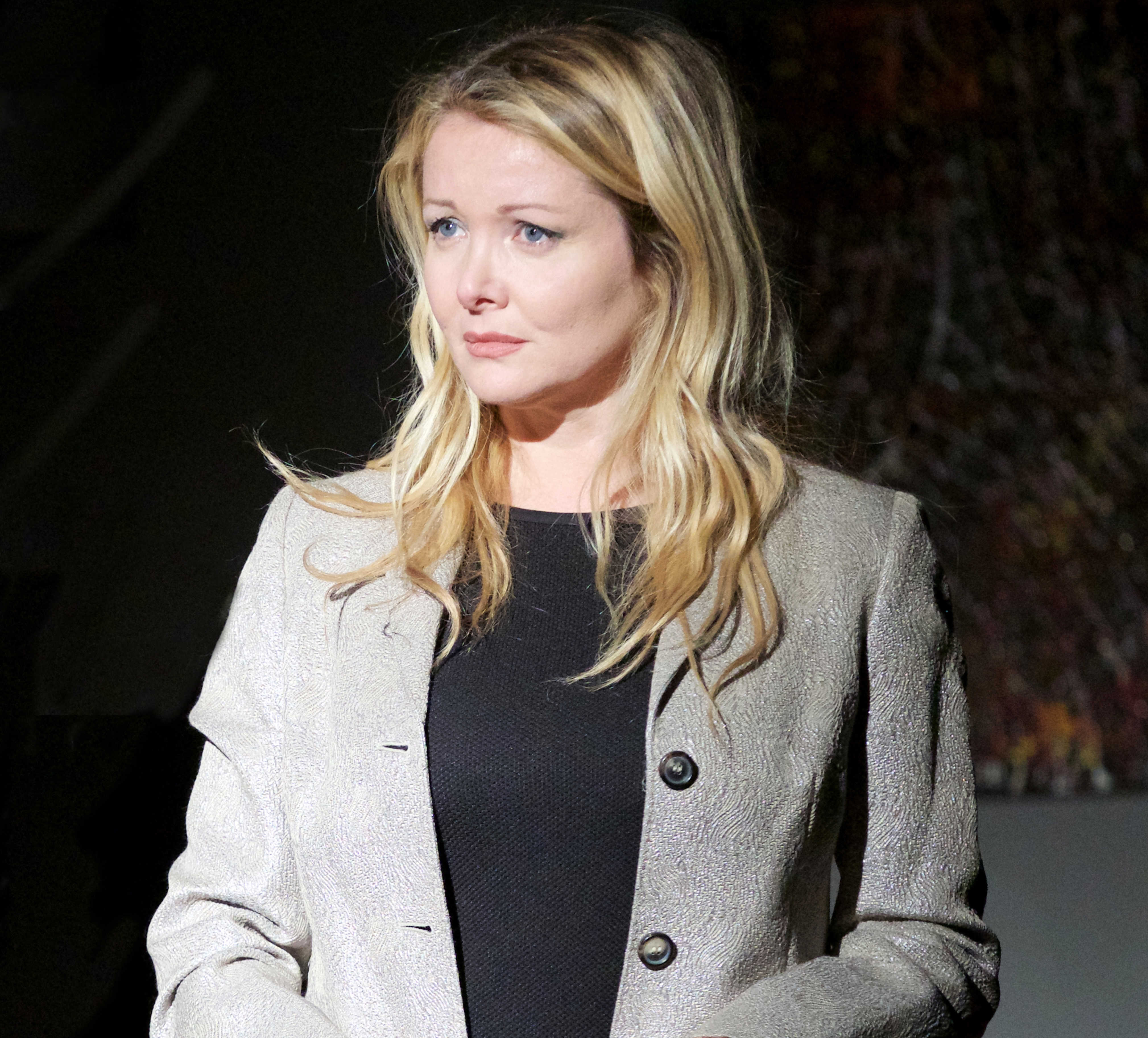 Angela nella scena finale dello spettacolo "Una fidanzata per papà"